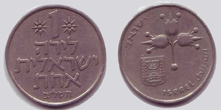 1 Israeli Lira coin - התשל"ב